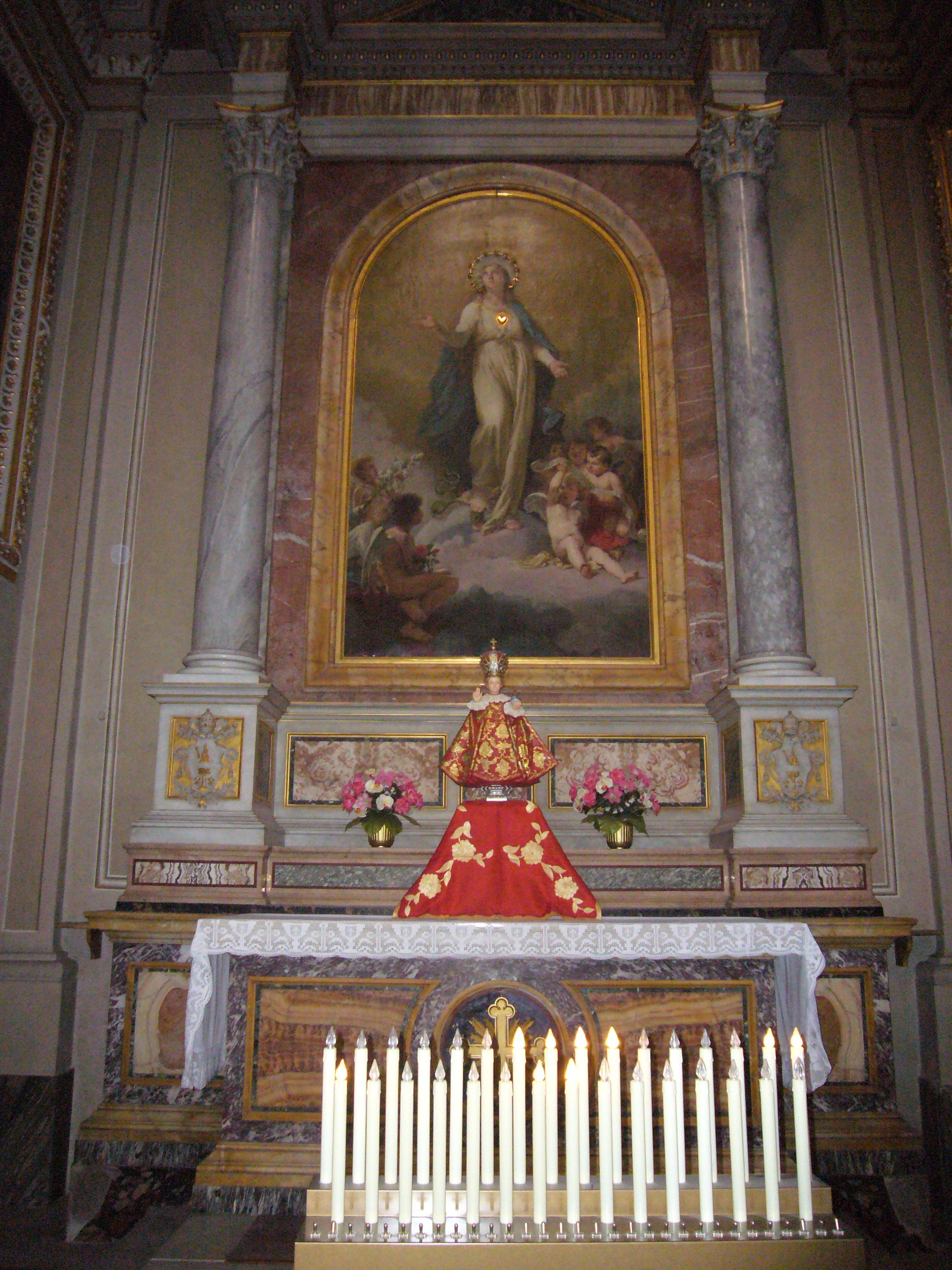 Roma, chiesa delle stimmate di San Francesco, altare dell'Immacolata e Bambino Gesù di Praga